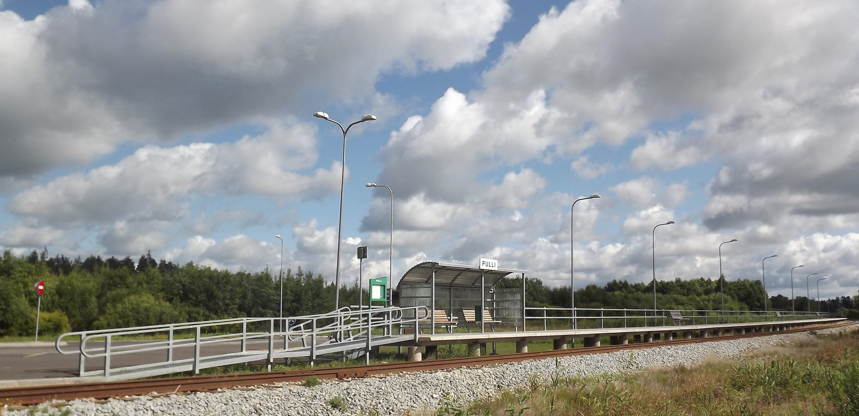 Pulli raudteepeatus